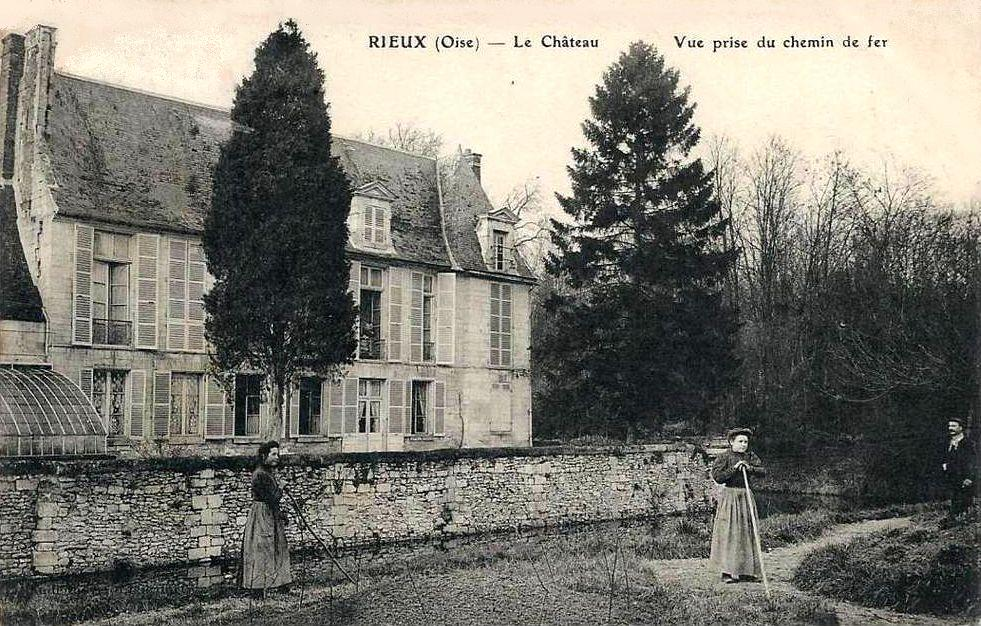 Aile principale du château, façade nord-est, visible aujourd'hui depuis le jardin municipal derrière l'école.